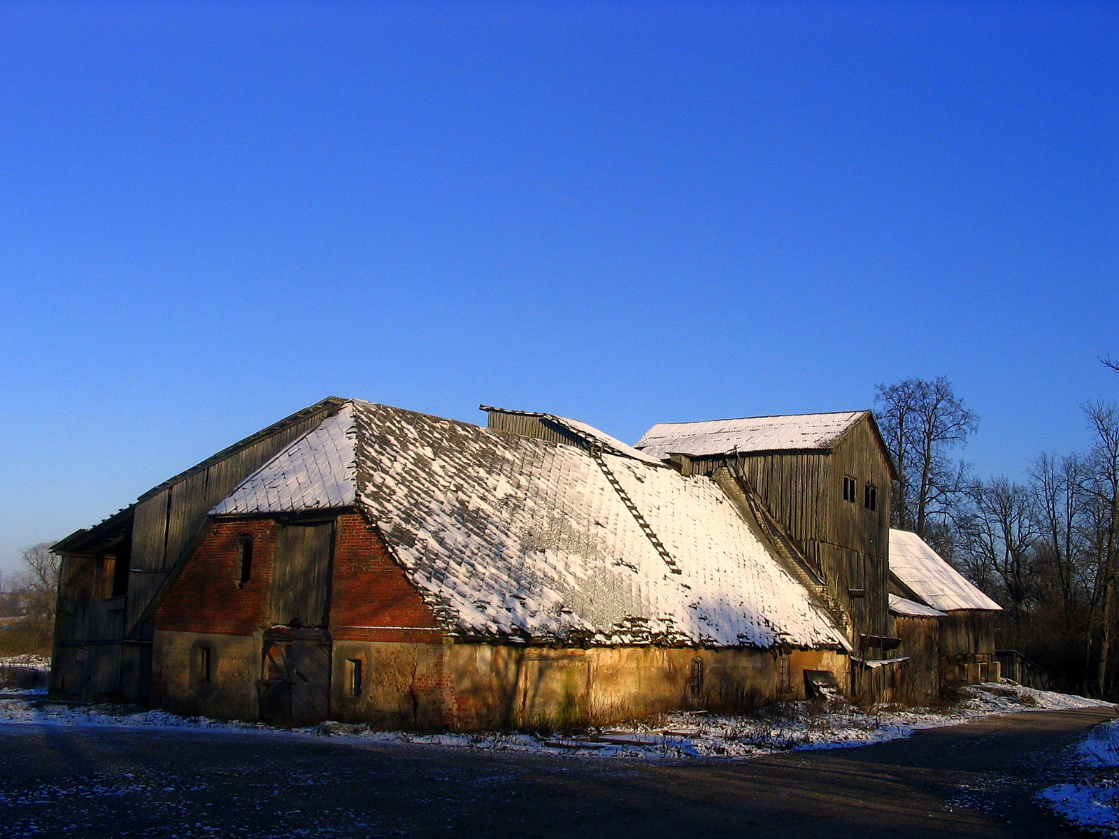 Klēts Vecvilgalē